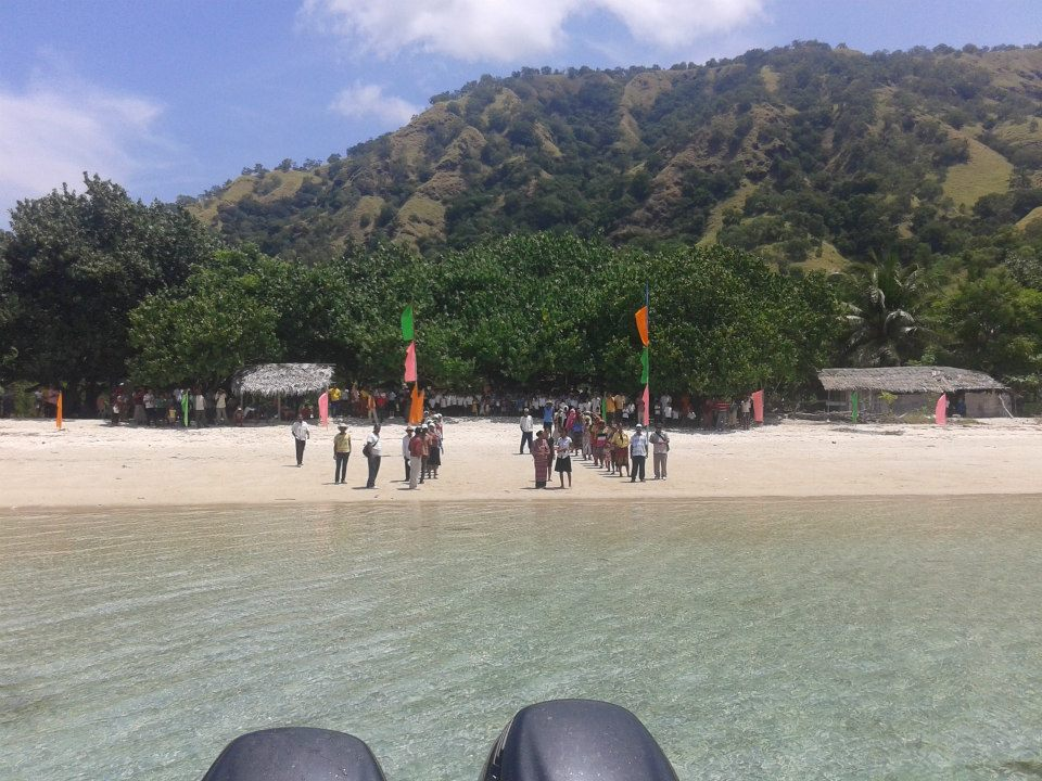 Atauro